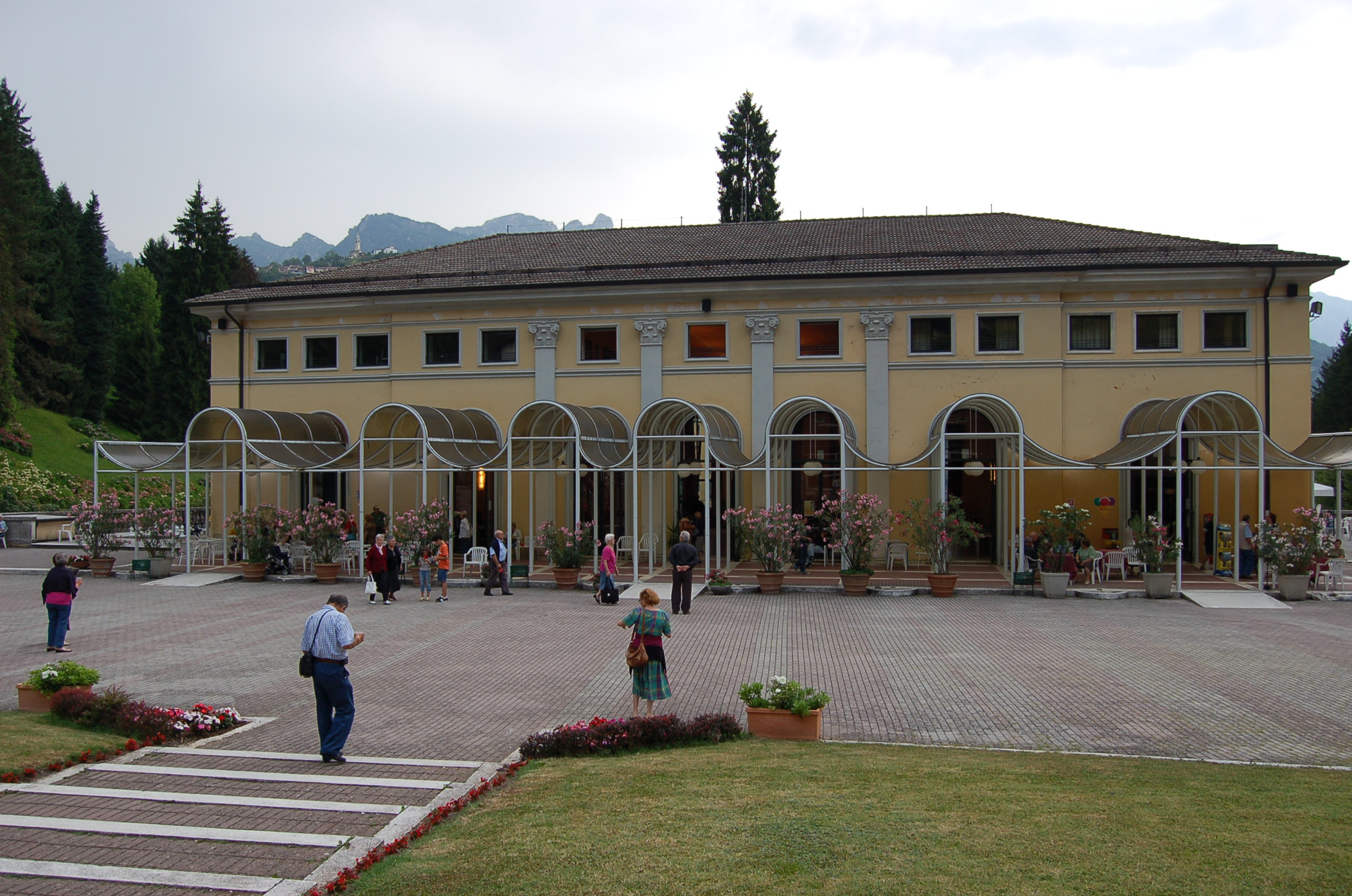 Terme di Recoaro Terme (VI)